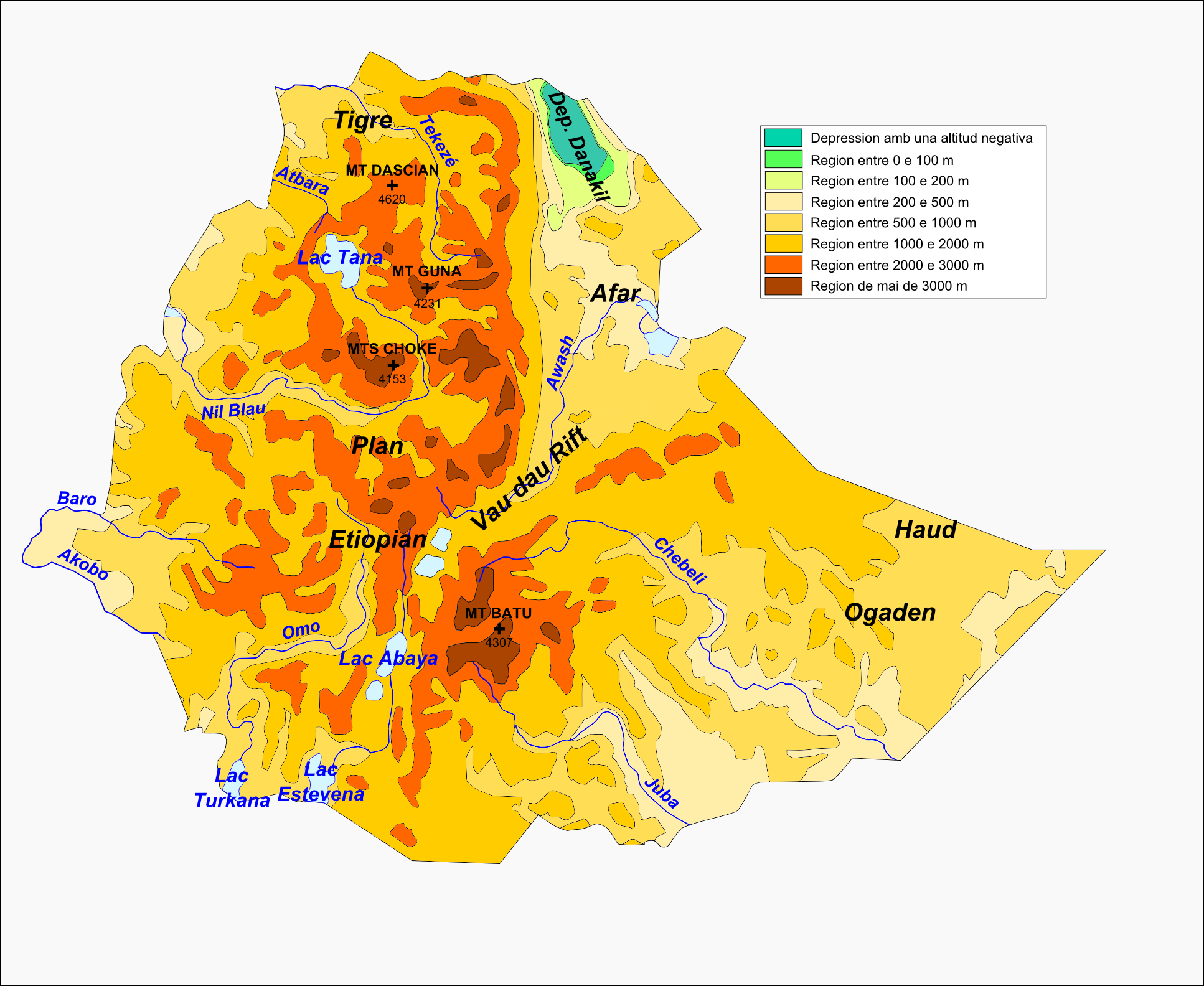 Topografia d'Etiopia.